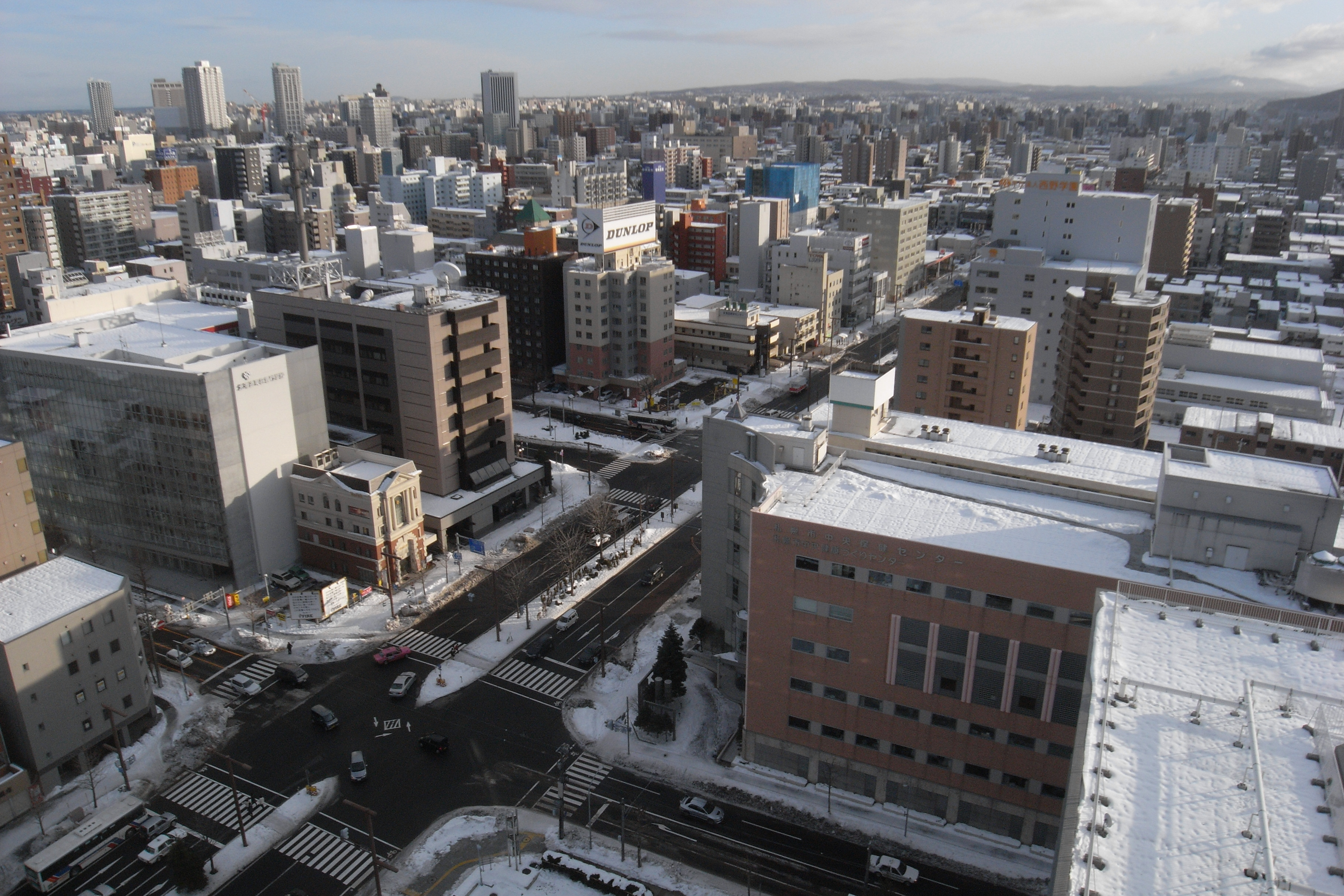 石山通（南3西11から南方向）